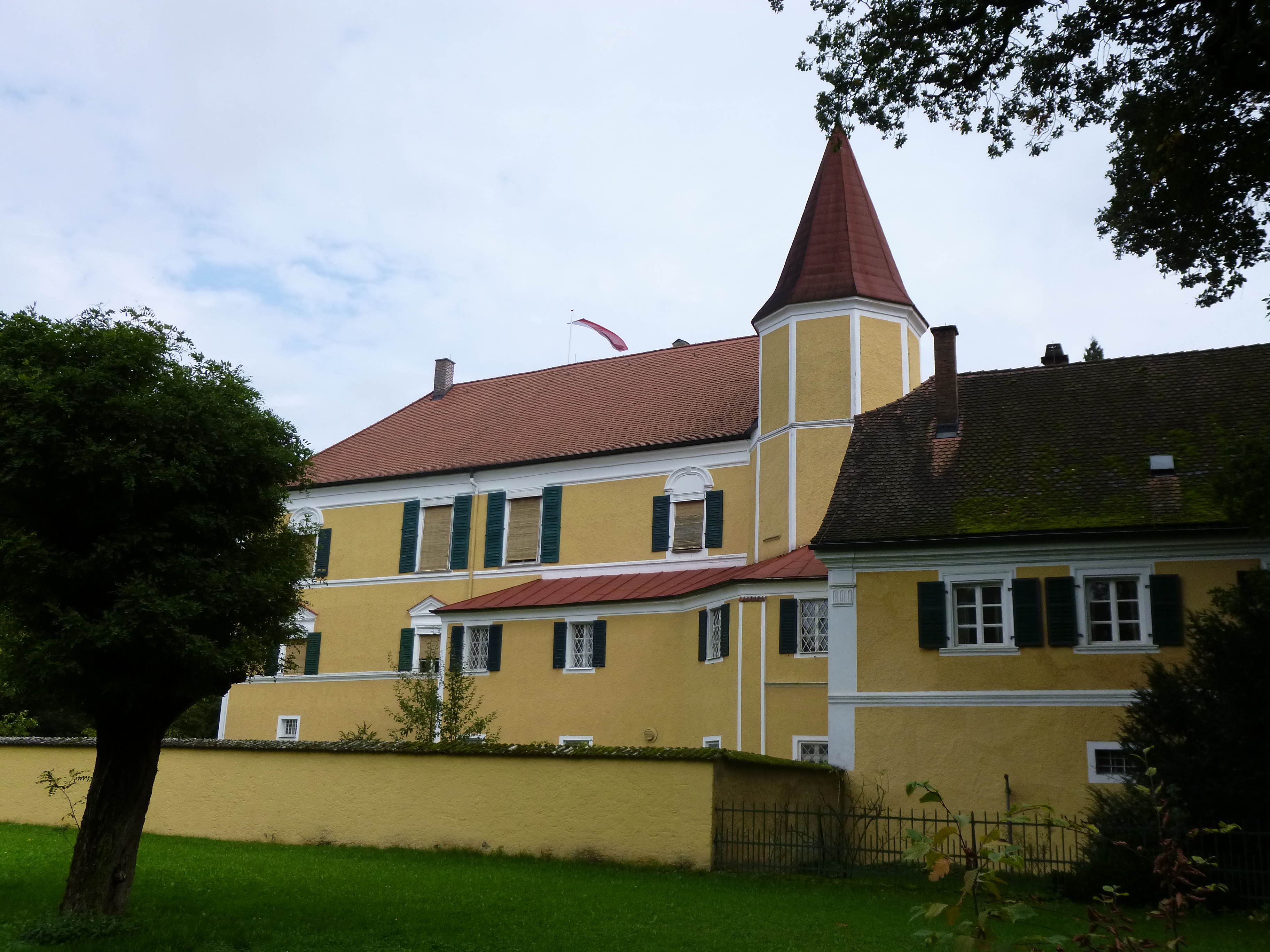 Schloss-Komplex Irlbach, Graf von Bray-Str. 14.This is a photograph of an architectural monument.